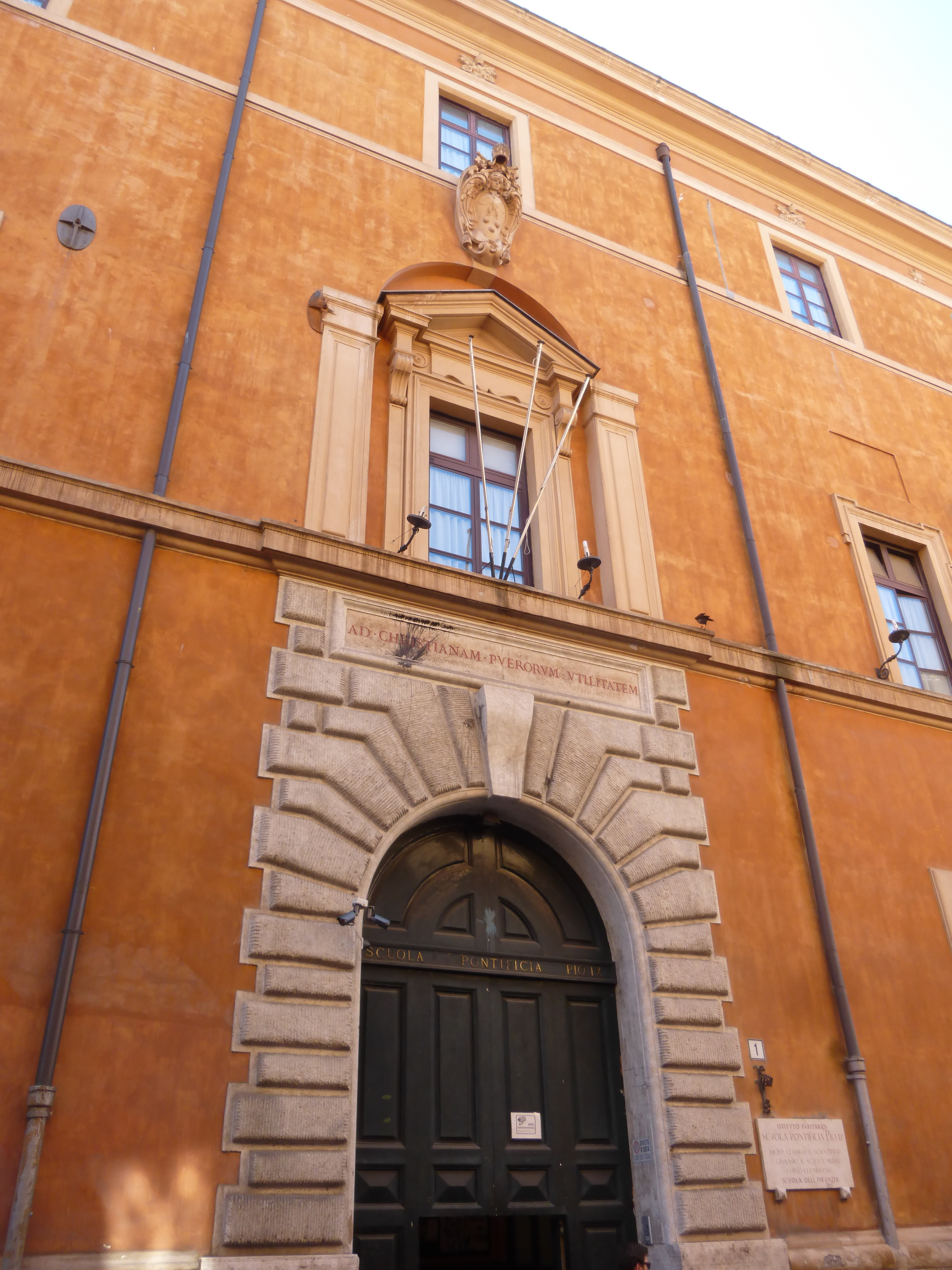 Roma, palazzo Serristori. Portone principale su via dei cavalieri del S. Sepolcro.